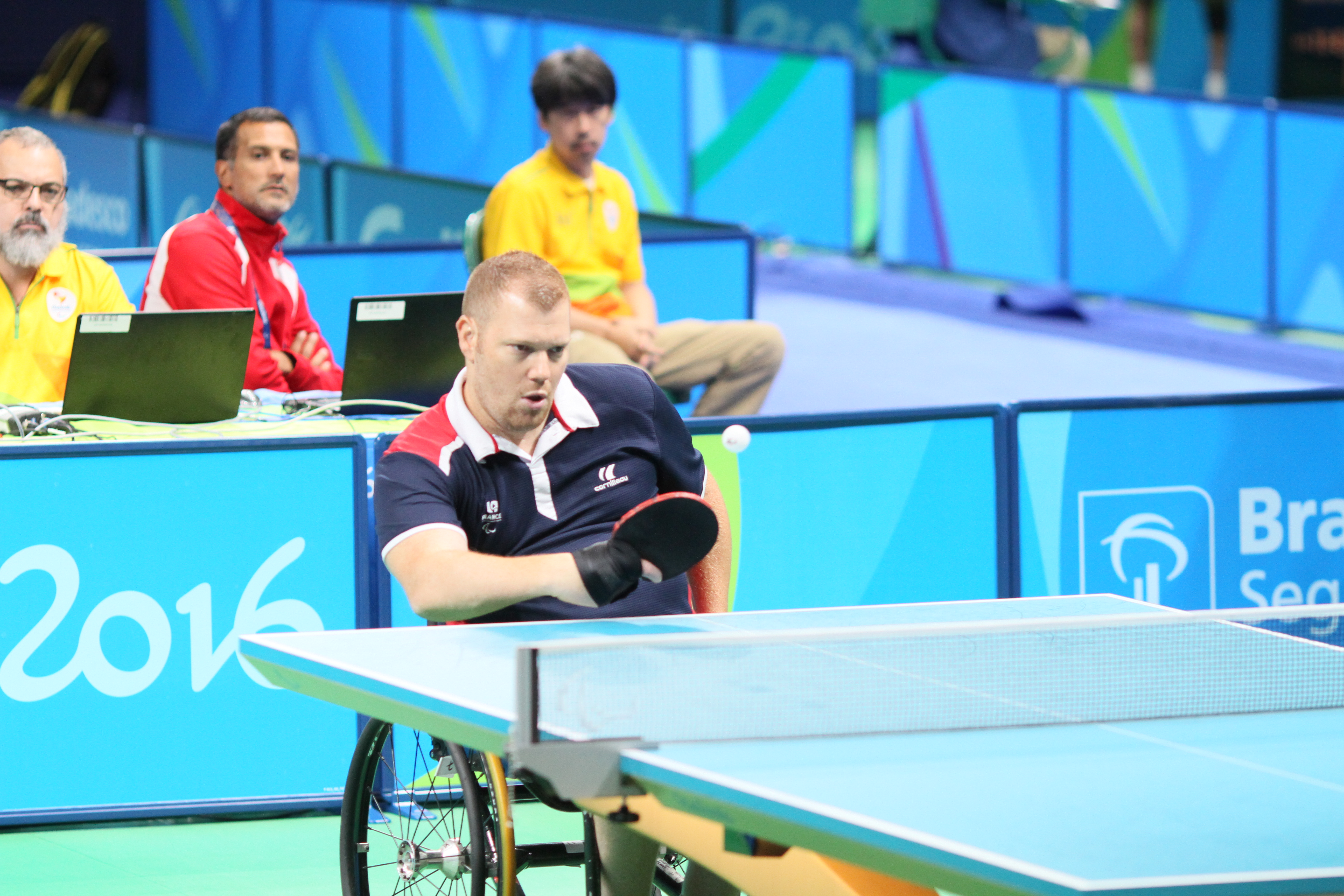 LAMIRAULT Fabien (FRA,M2) IMG_4963